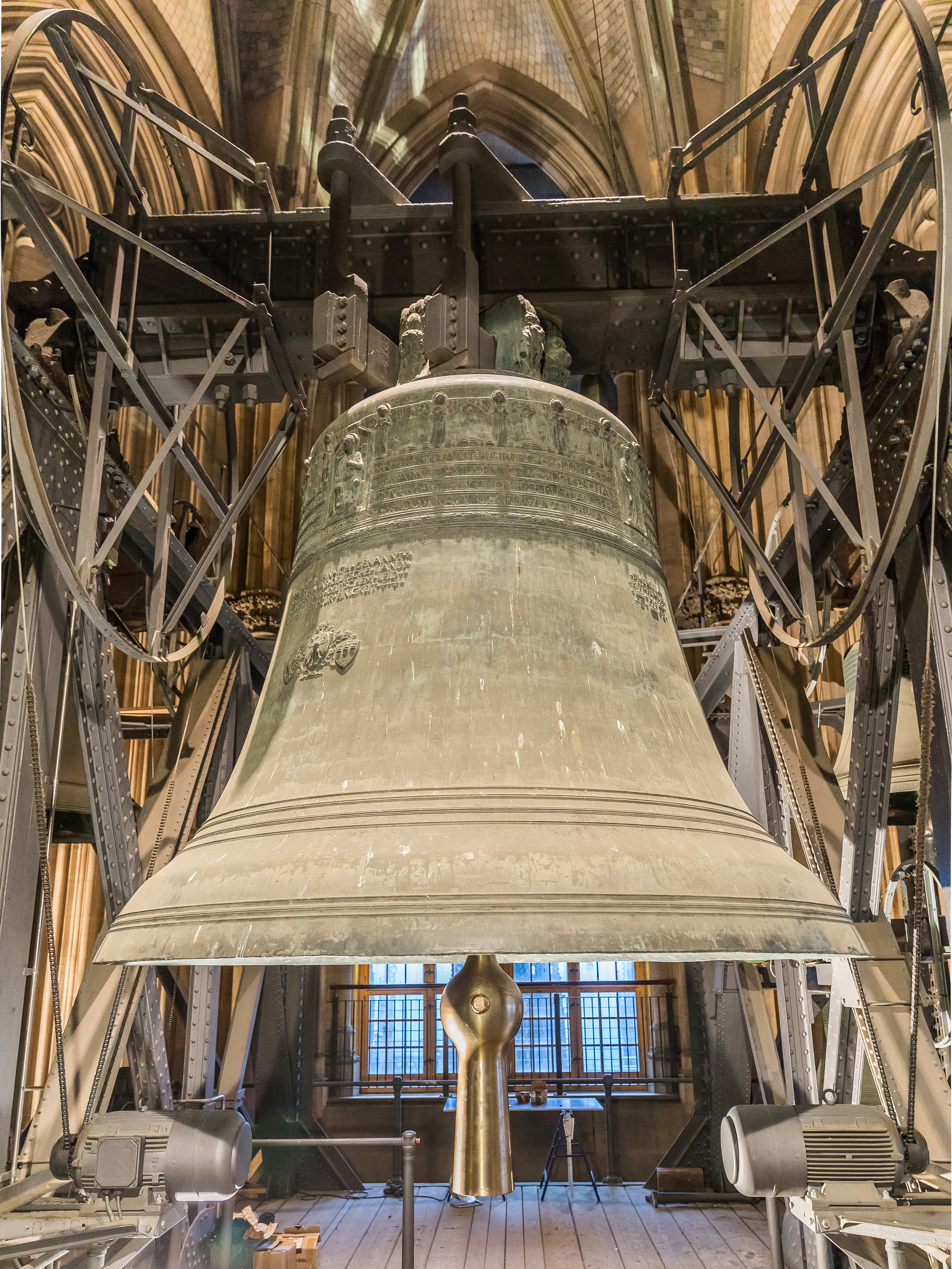 Pressetermin zum Probeläuten des Dicker Pitter (St. Petersglocke) im Kölner Dom nach Montage einer neuen Klöppelaufhängung.